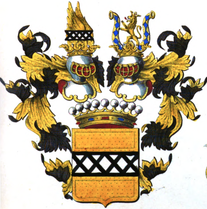 Armoiries de la famille de Moffarts